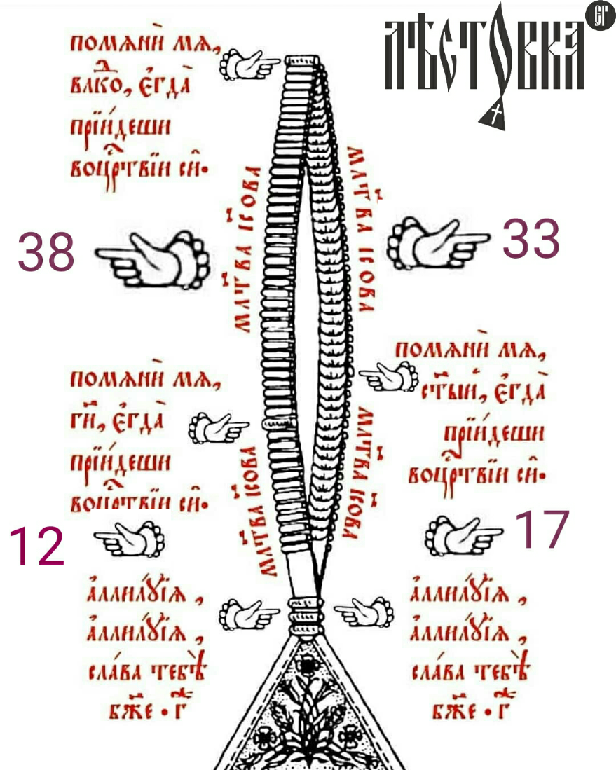 Схема лестовки с молитвами, которые вставляются внутрь